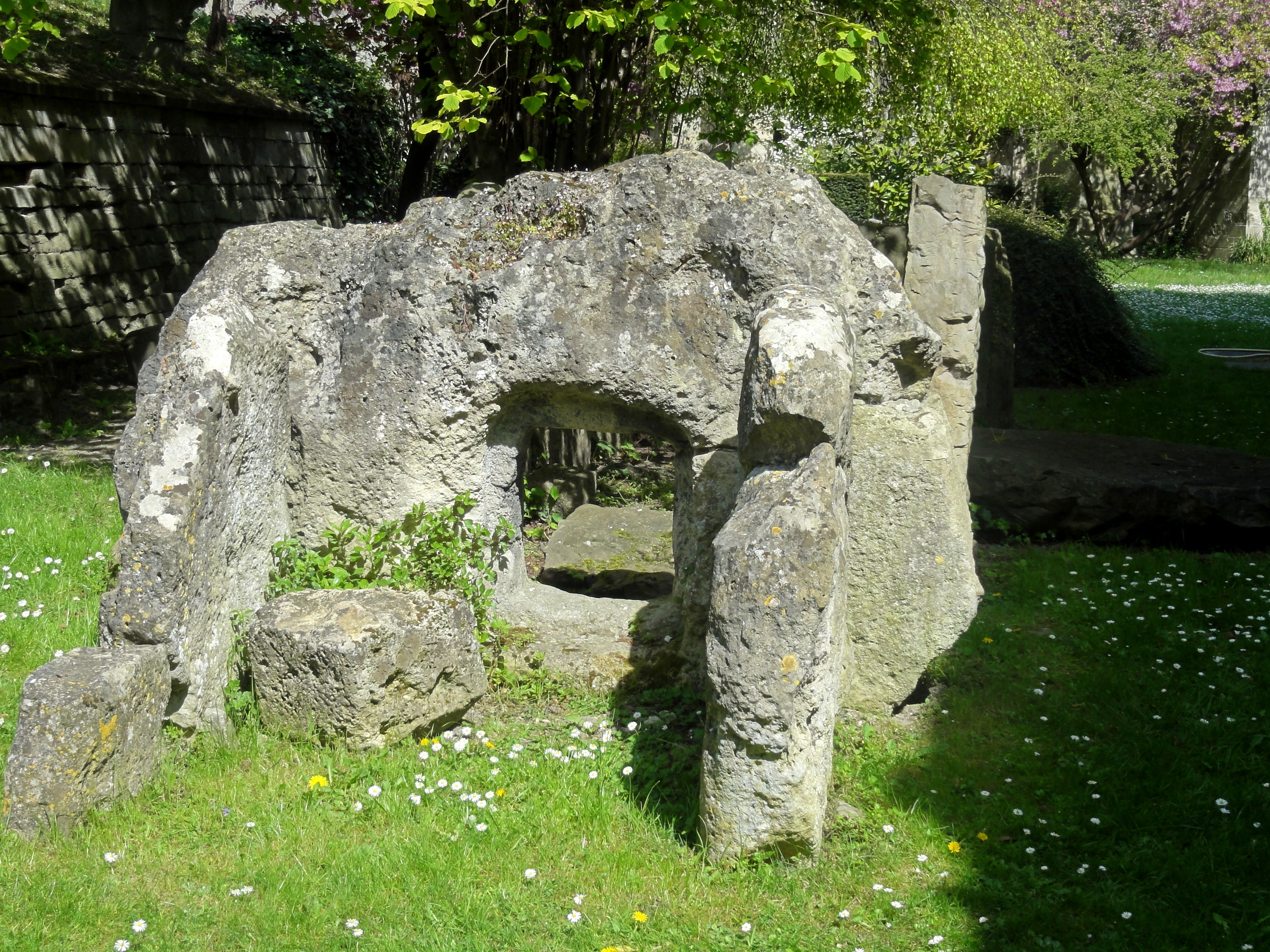 Musée Tavet-Delacour, galerie couverte de Dampont, commune d'Us.